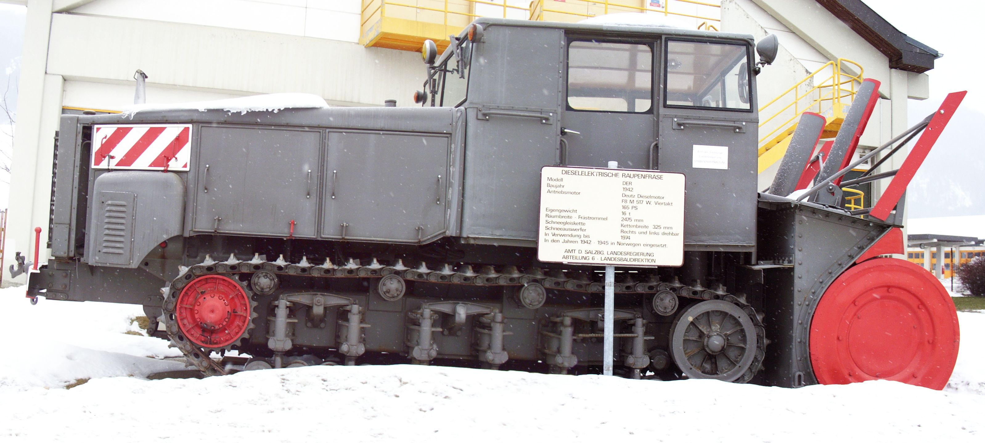 Dieselelektrische Raupenfräse (Bildmontage, fotographiert in Mauterndorf). Das schild meldet: Diesel-elektrische Raupenfräse. Modell: DER; Baujahr 1942; Antriebsmotor: Deutz Dieselmotor, F8 M 517 W. Viertakt, 165 PS; Eigengewicht 16 Tonnen; Räumbreite - Frästrommel: 2475 mm; Schneegleiskette: Kettenbreite 325 mm; Schneeauswerfer: Rechts und links drehbar; In Verwendung bis 1974. In den Jahren 1942–1945 in Norwegen eingesetzt Amt der Salzburger Landesregierung, Abteilung 6 - Landesbaudirektion